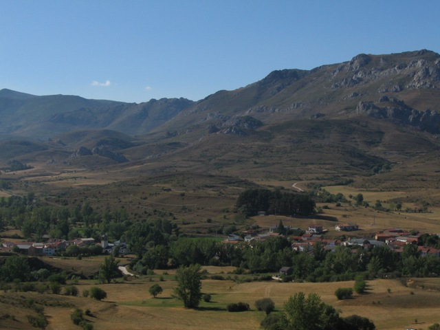 Vista de Rodiezmo